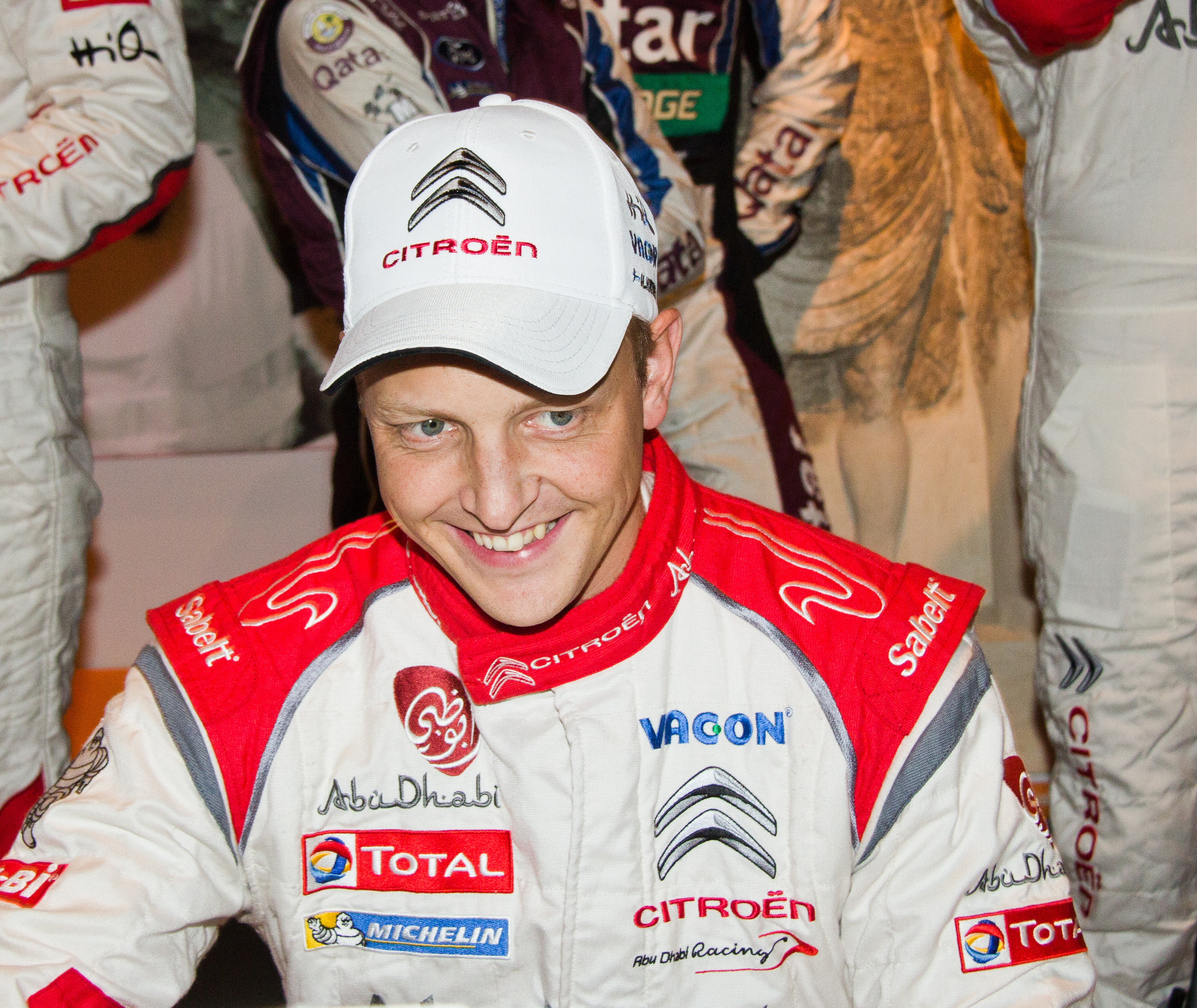 ADAC Rallye Deutschland 2013 - Empfang der Stadt Köln - Mikko Hirvonen. Eintragung in der Gästebuch der Stadt Köln